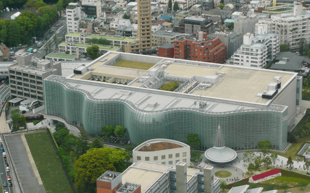 六本木ヒルズ森タワー展望台から見た国立新美術館 一部編集の上で2007年5月12日にアップロード